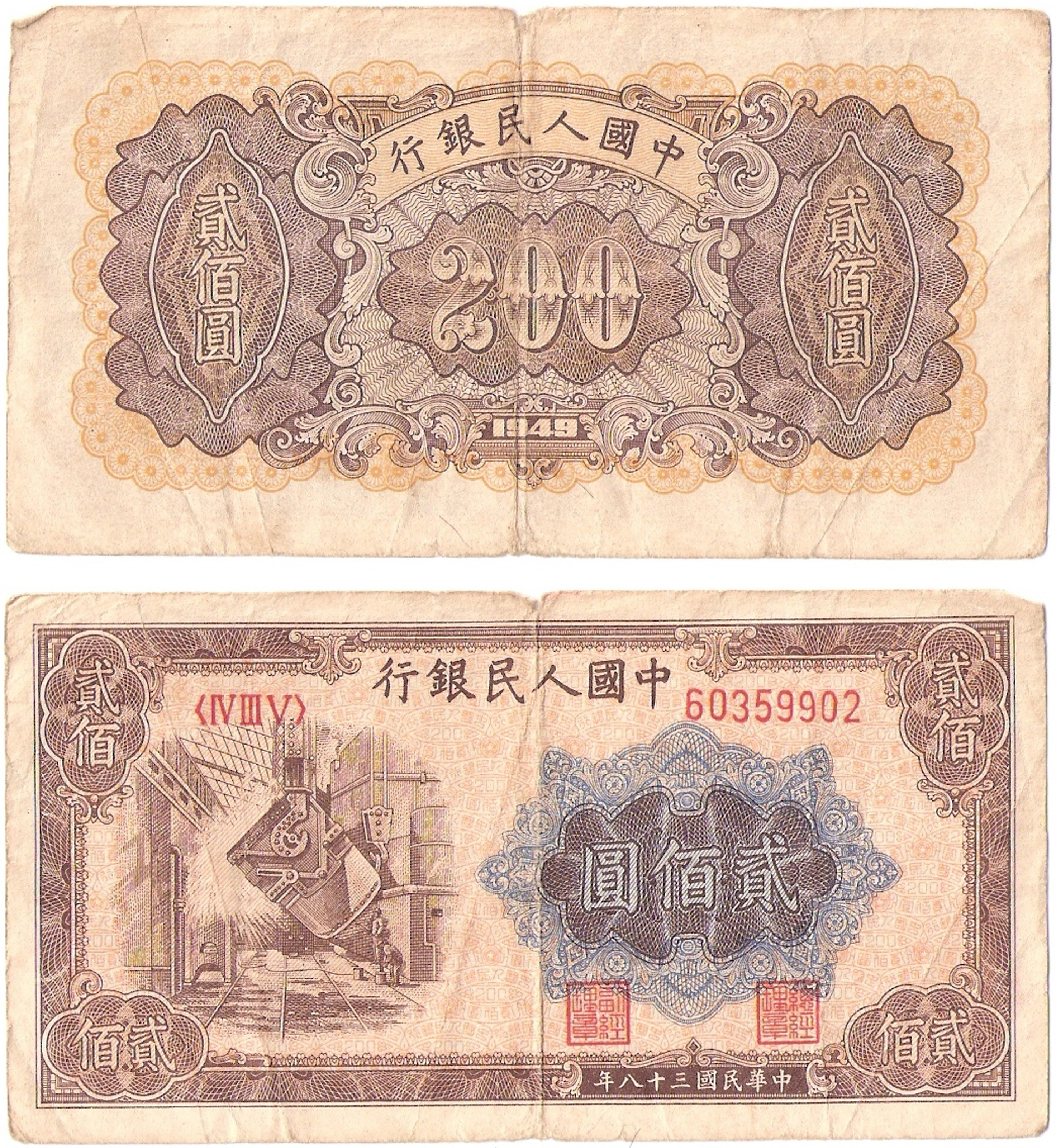 第一版人民币（RMB）200元，1949年发行。